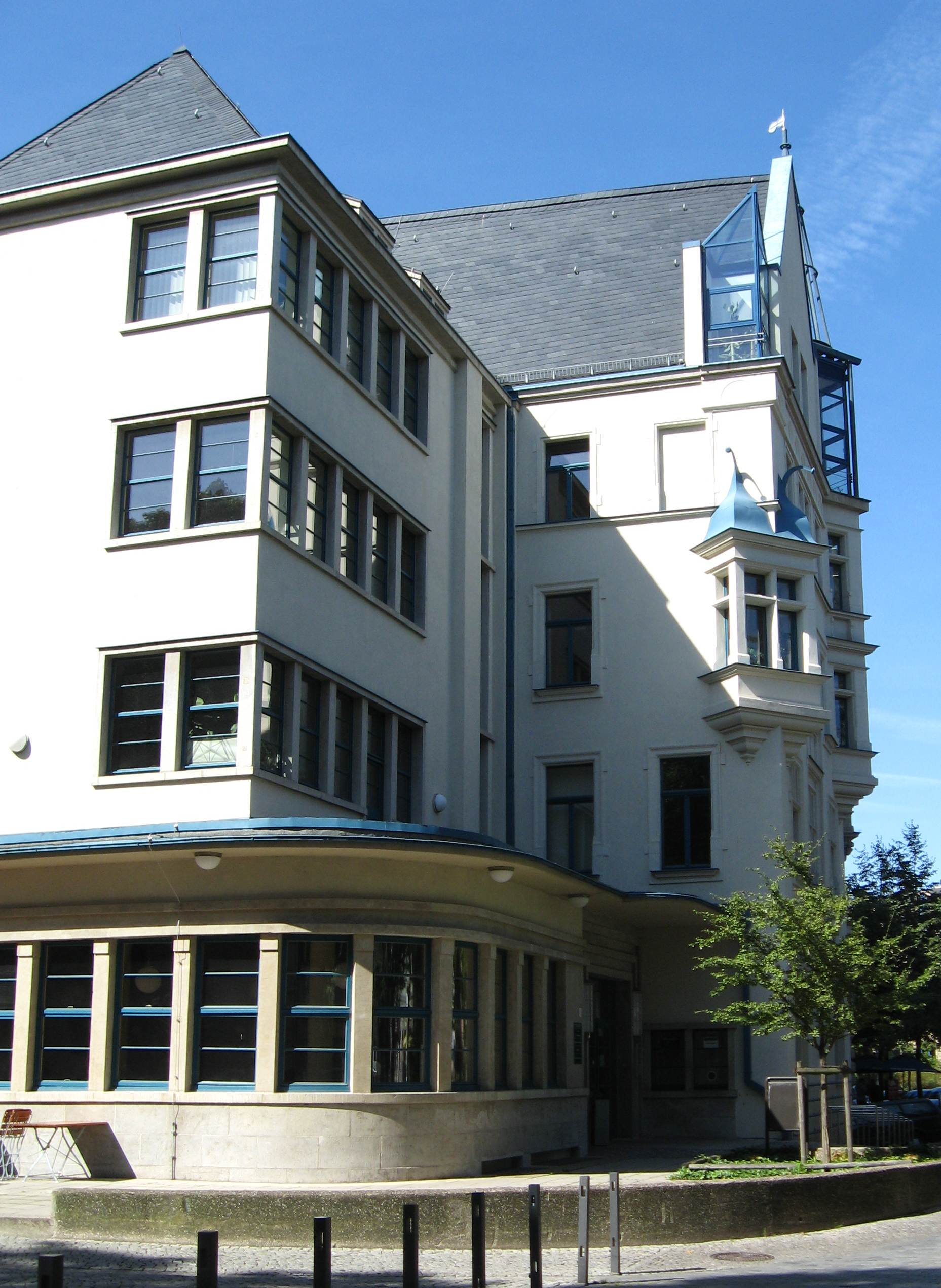 Die Universitätsmensa Burse zur Tulpe, Universitätsring 5, in Halle (Saale).